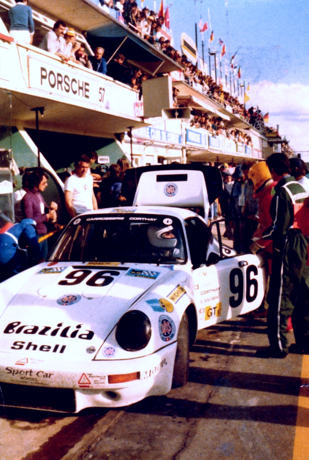 La Porsche 911 Carrera d'Antoine Salamin aux 24 heures du Mans 1977, lors d'un arrêt aux boxes